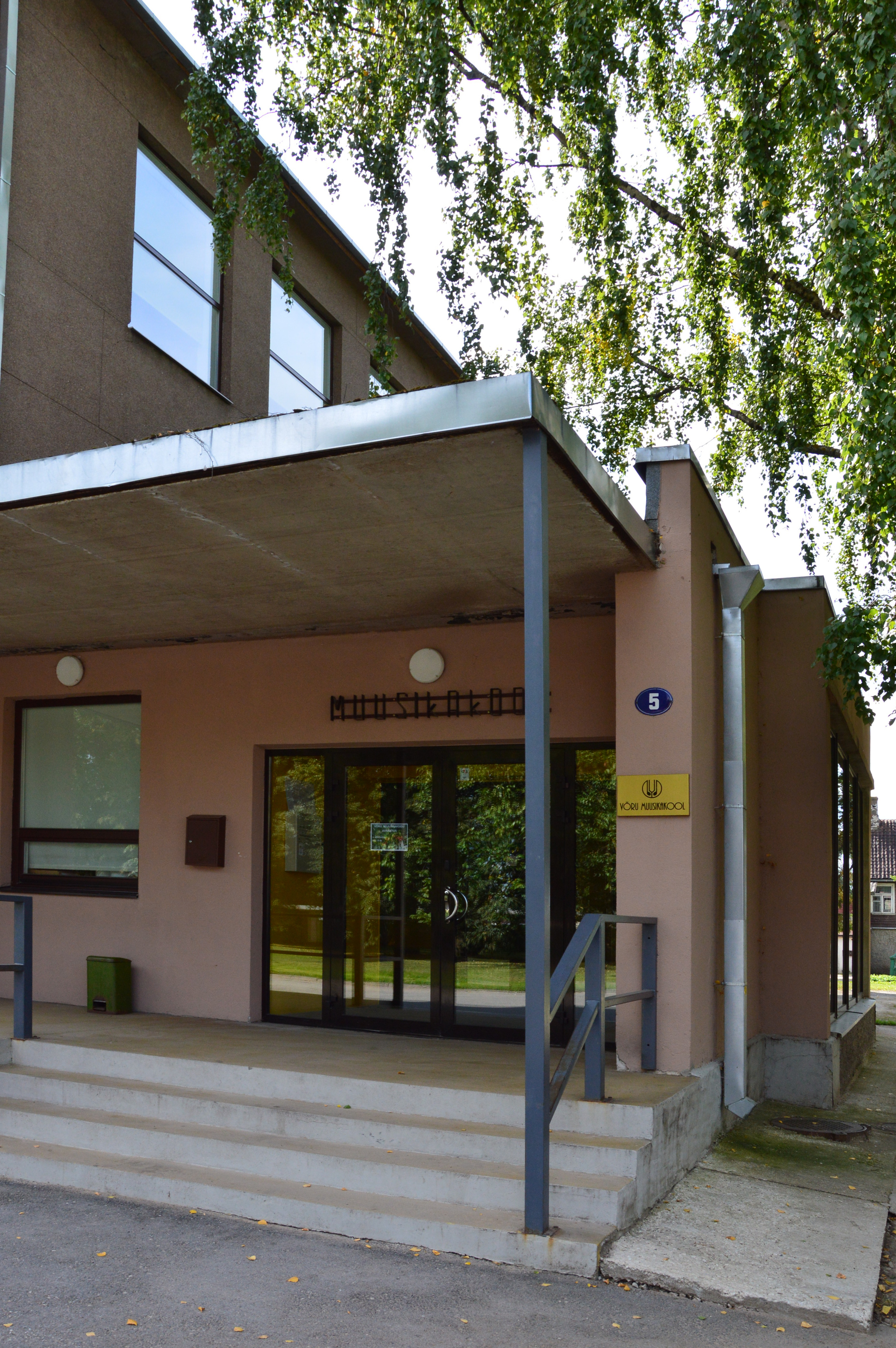 Võru muusikakool